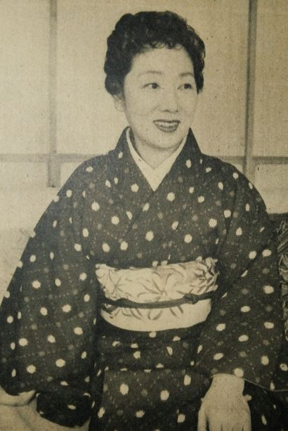 市丸